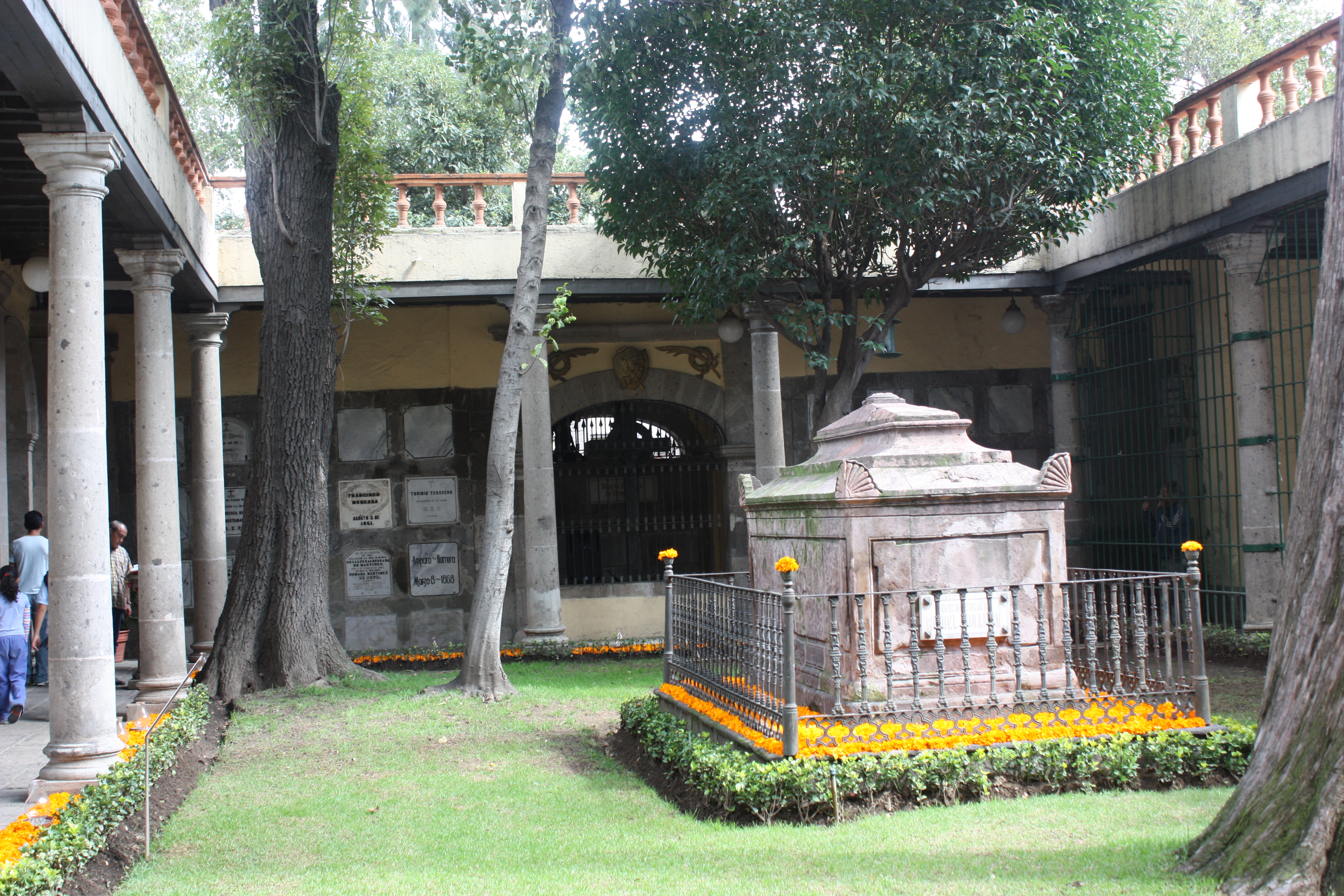 Panteón de los Hombres Ilustres